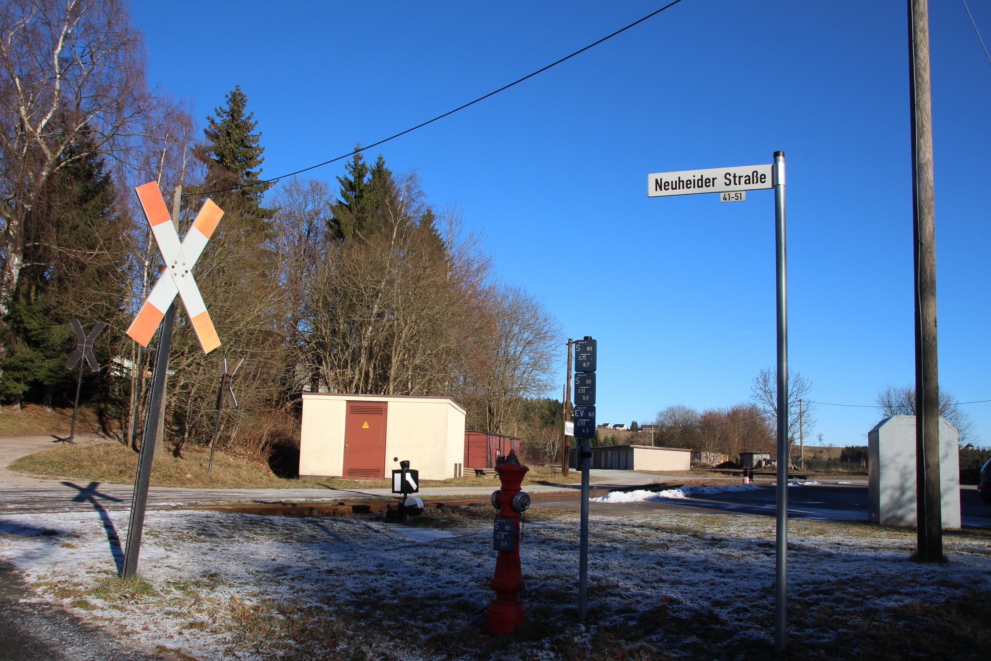 Neuheide war Haltepunkt der Schmalspurbahn Wilkau-Haßlau–Carlsfeld. Die Reichsbahn führte ab 1950 die Bezeichnung Schönheide Nord ein. Seit den 1990er Jahren betreibt die Museumsbahn Schönheide e.V. die auf der Strecke zwischen dem Bahnhof Schönheide Mitte in Schönheide im Erzgebirge und Stützengrün regelmäßig einen Museumsbetrieb Link zur Webseite der Museumsbahn und hält dabei am Haltepunkt in Neuheide.